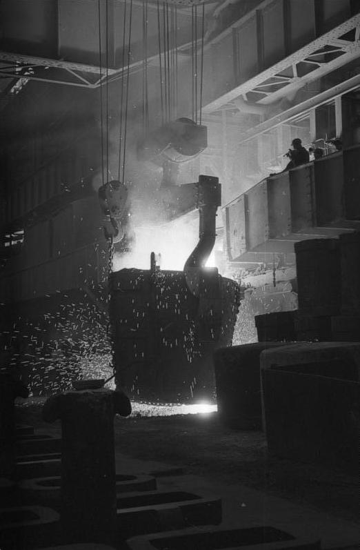 Pakistanischer Staatspräsident Ayoub Khan zu Besuch in der Henrichshütte der Ruhrstahl AG. in Hattingen